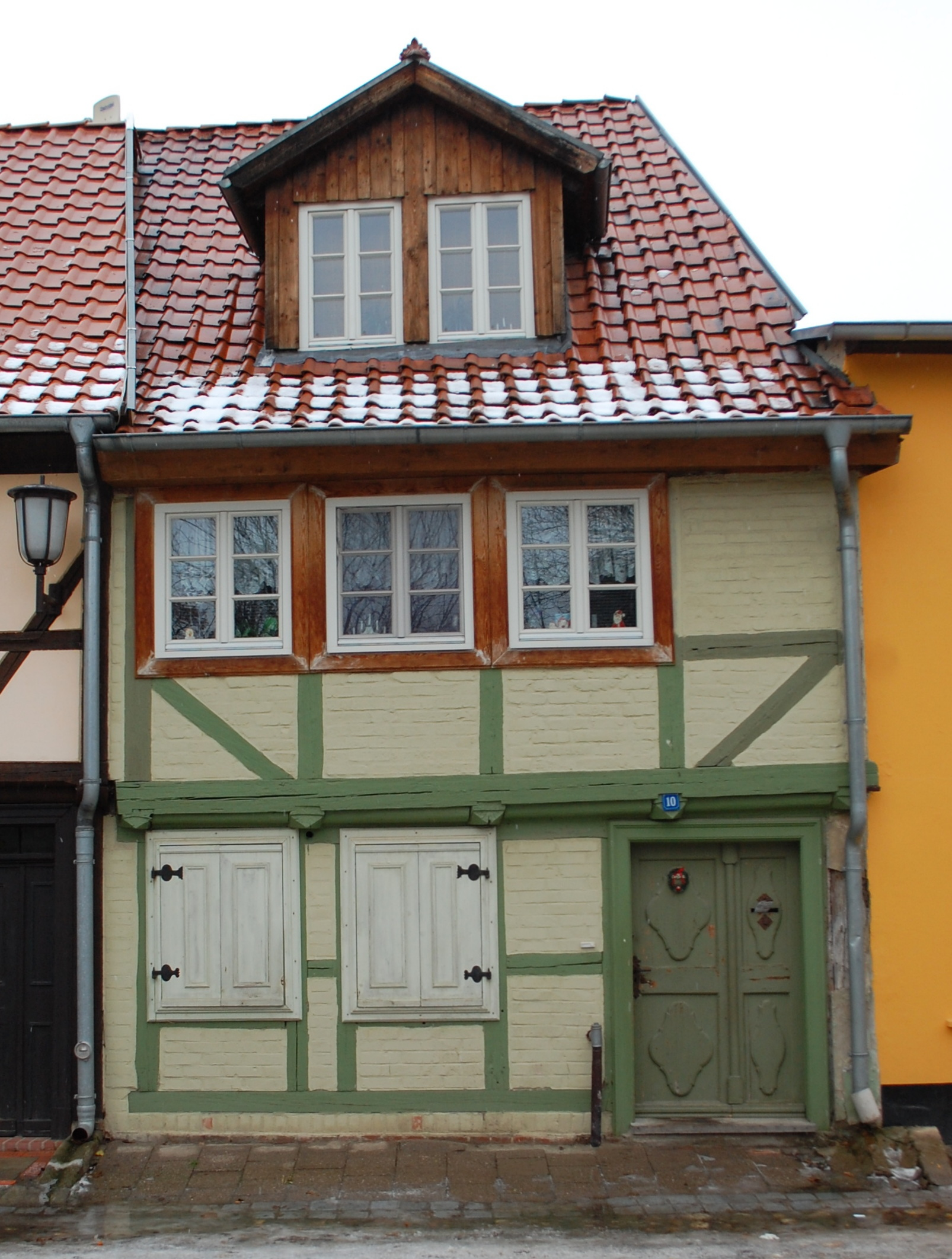 Haus Hinter der Mauer 19 in Quedlinburg